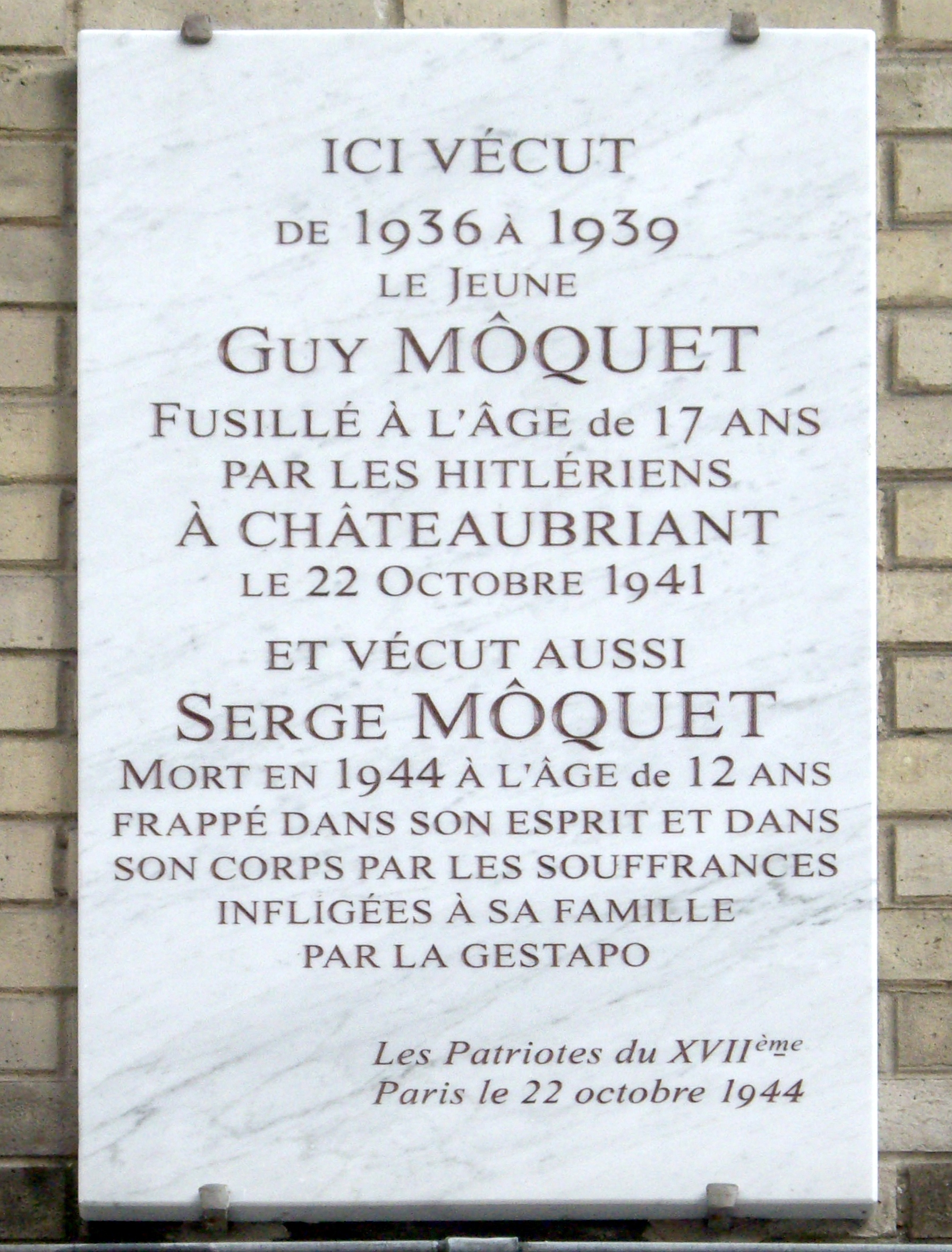 Plaque commémorative, 34 rue Baron, Paris 17e.« Ici vécut de 1936 à 1939 le jeune Guy Môquet, fusillé à l'âge de 17 ans par les hitlériens à Châteaubriant le 22 octobre 1941, et vécut aussi Serge Môquet, mort en 1944 à l'âge de 12 ans, frappé dans son esprit et dans son corps par les souffrances infligées à sa famille par la Gestapo.Les patriotes du XVIIe, Paris, le 22 octobre 1944. »